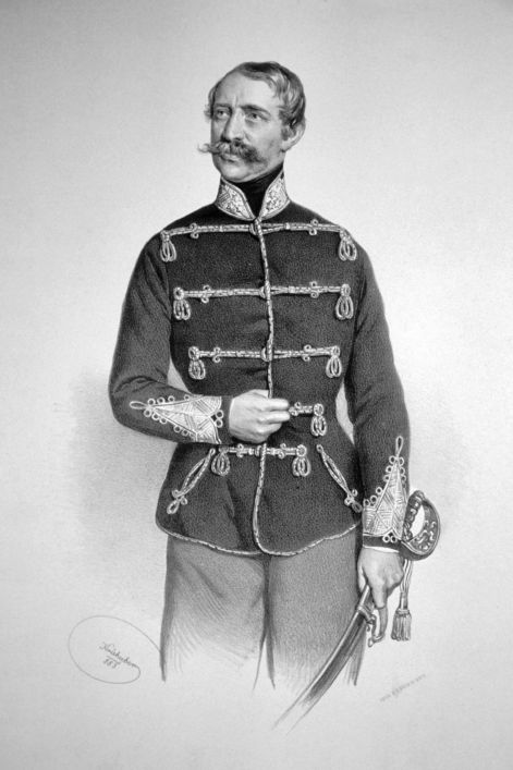 Württembergi Sándor herceg. Joseph Kriehuber litográfiája, 1853. Kis-rhédei Rhédey Klaudia férje.